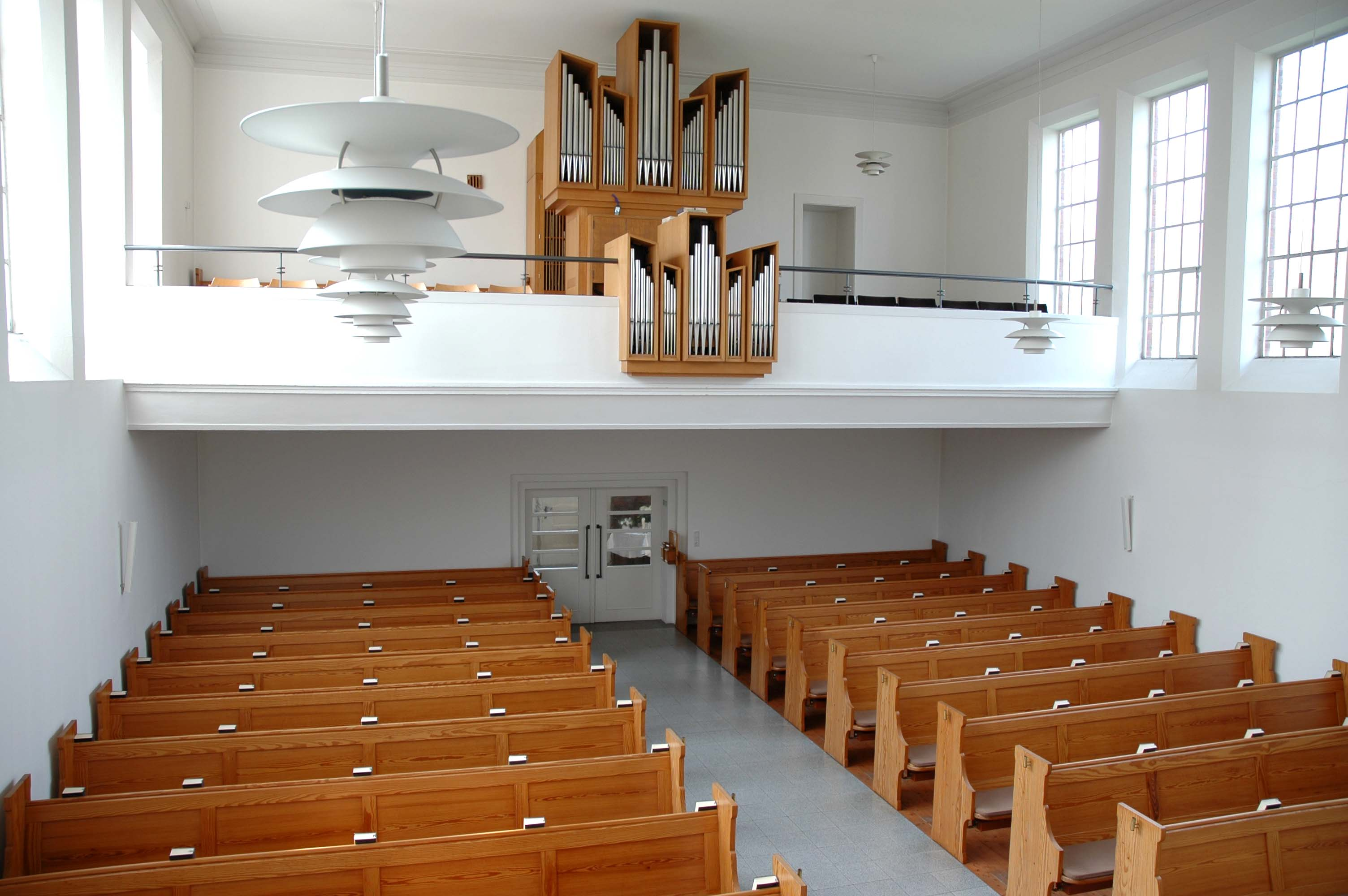 Orgel der Friedenskirche Wiesmoor